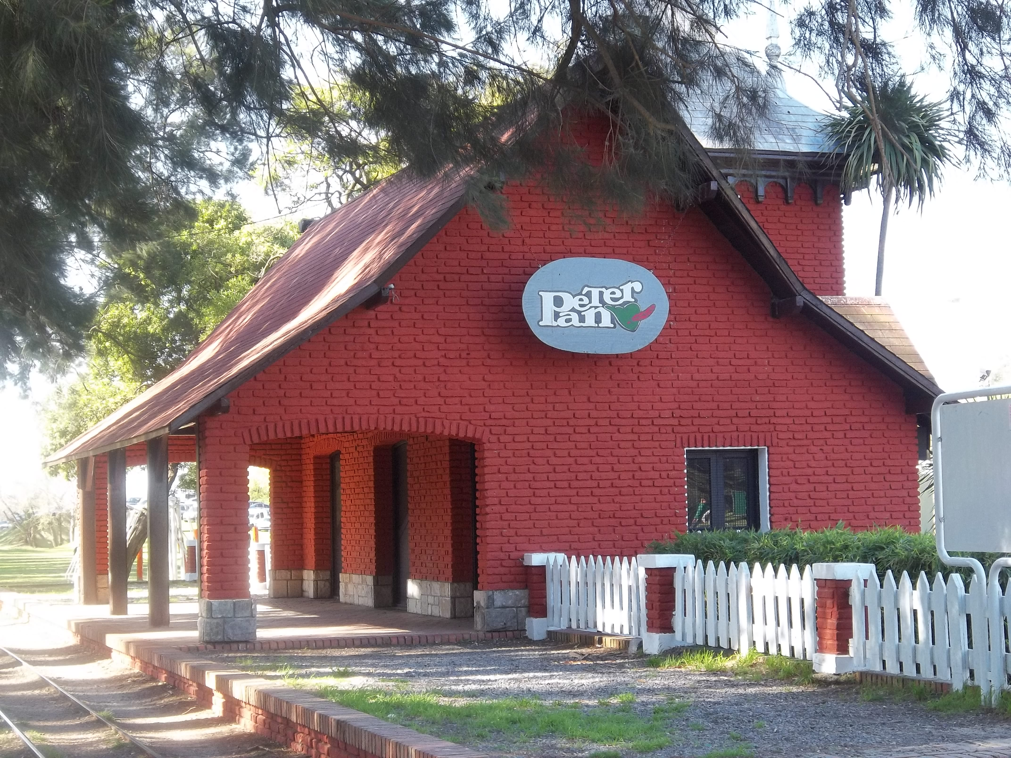 Estación ferroviaria Peter Pan de la República de los Niños en Manuel B. Gonnet, partido de La Plata, provincia de Buenos Aires, Argentina.